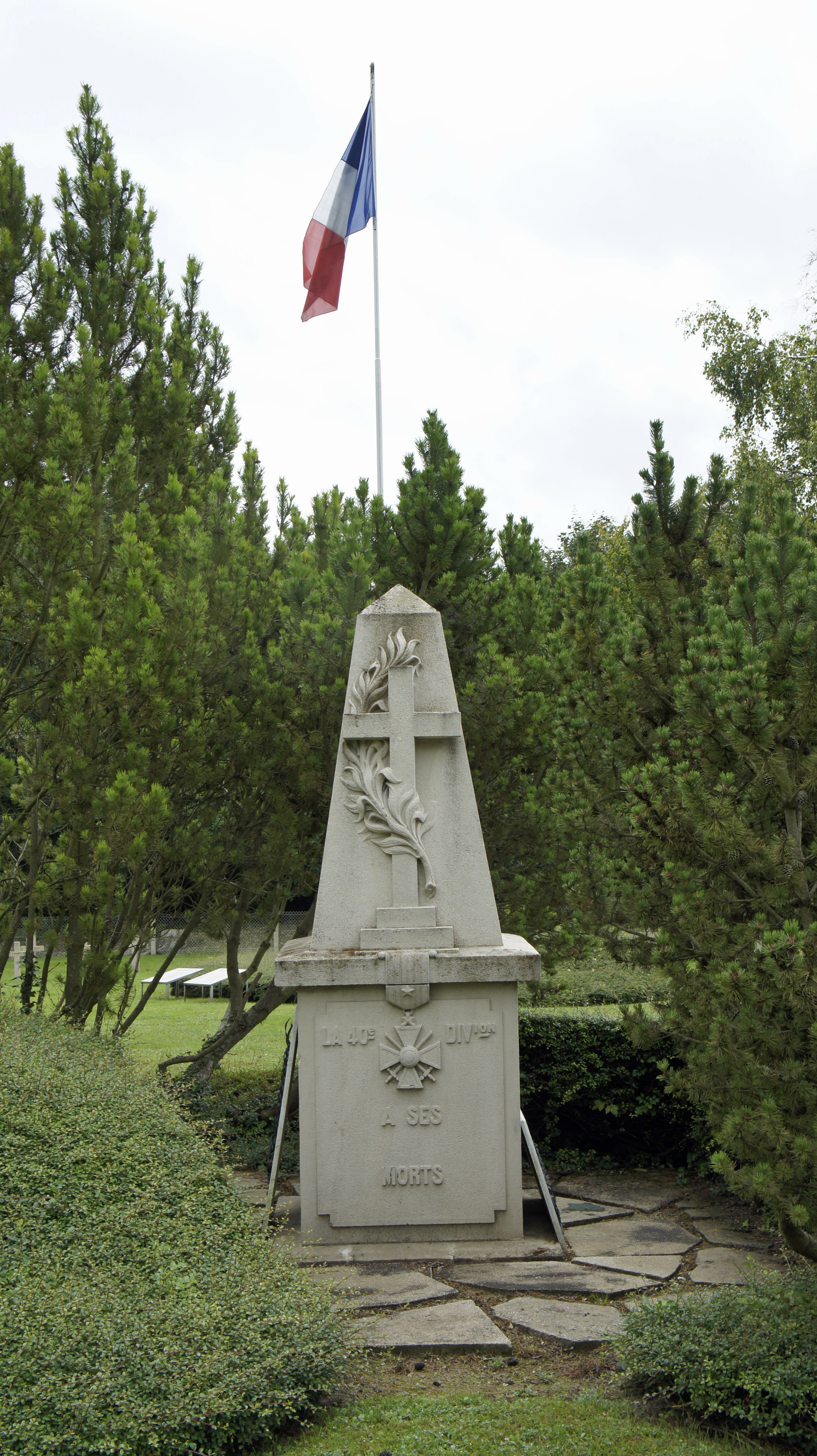 Mémorial à la 40e division, à la 80e brigade, au 40e régiment d'artilleri, aux compagnies du génie 6/2 pionniers 6/52 et au 145e régiment d'infanterie territoraile dans la Nécropole de Mourmelon, .